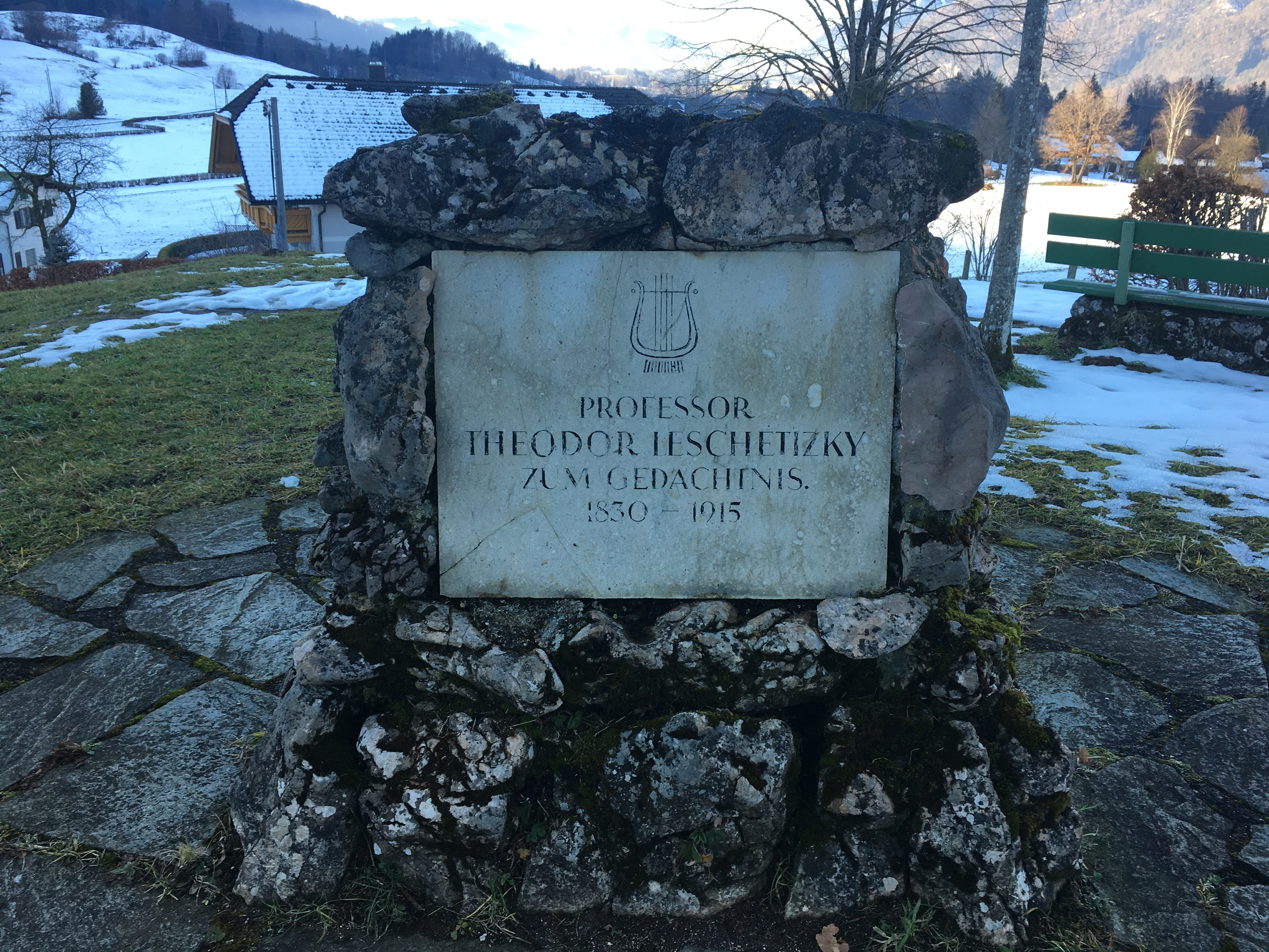 Denkmal für Theodor Leschetizky (1830-1915) auf der Leschtizky-Höhe in Bad Ischl